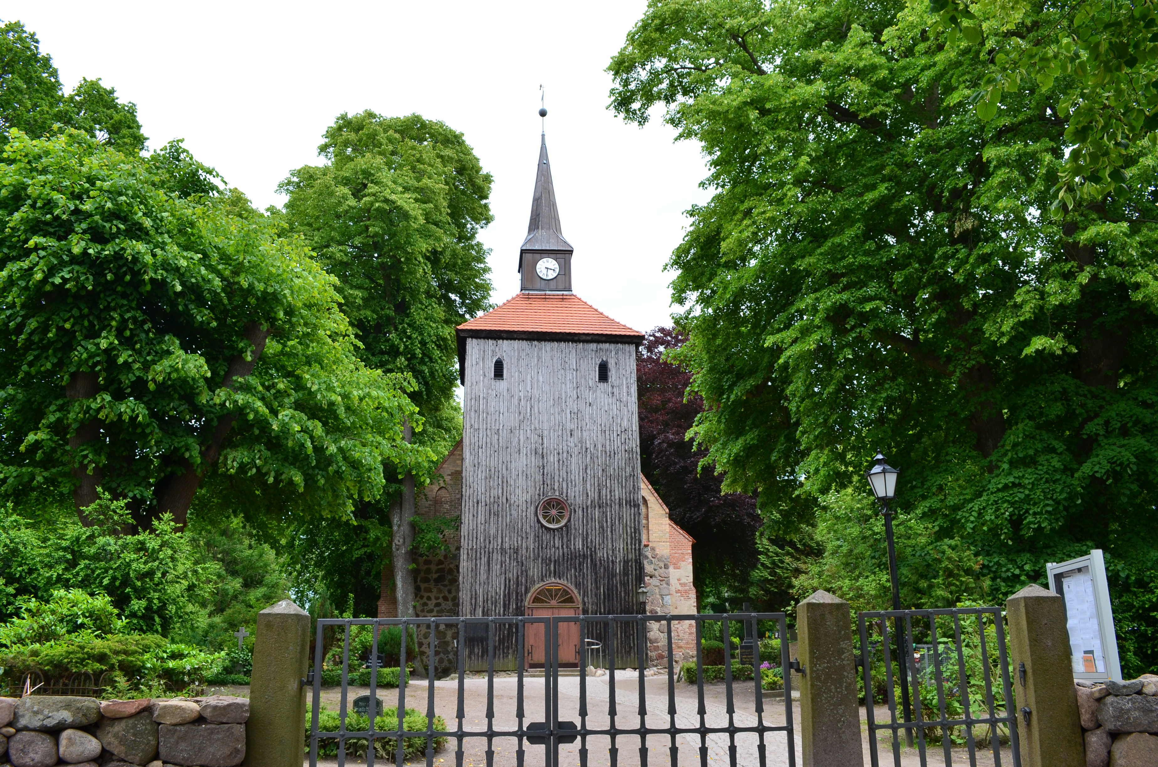 Kühlungsborn, Schlossstraße, ev. Johanniskirche, Kirchturm außen